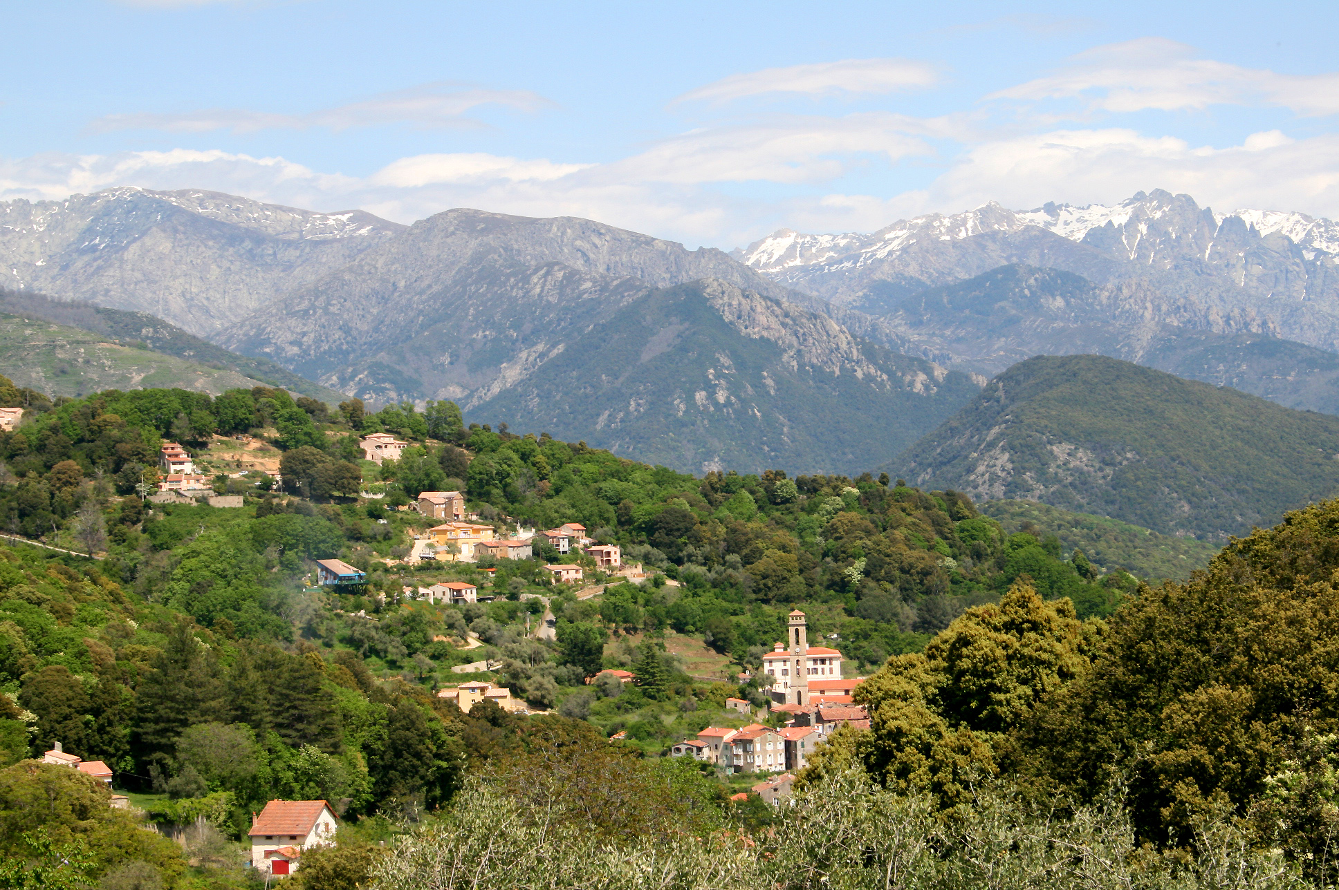 Vico France (Corse du Sud), canton des Deux Sorru. Corsu: Vicu Francia (Corsica suttana), Dui Sorru. Walon: Vico - France - Corse do Sud, canton dès Deus Sorru.